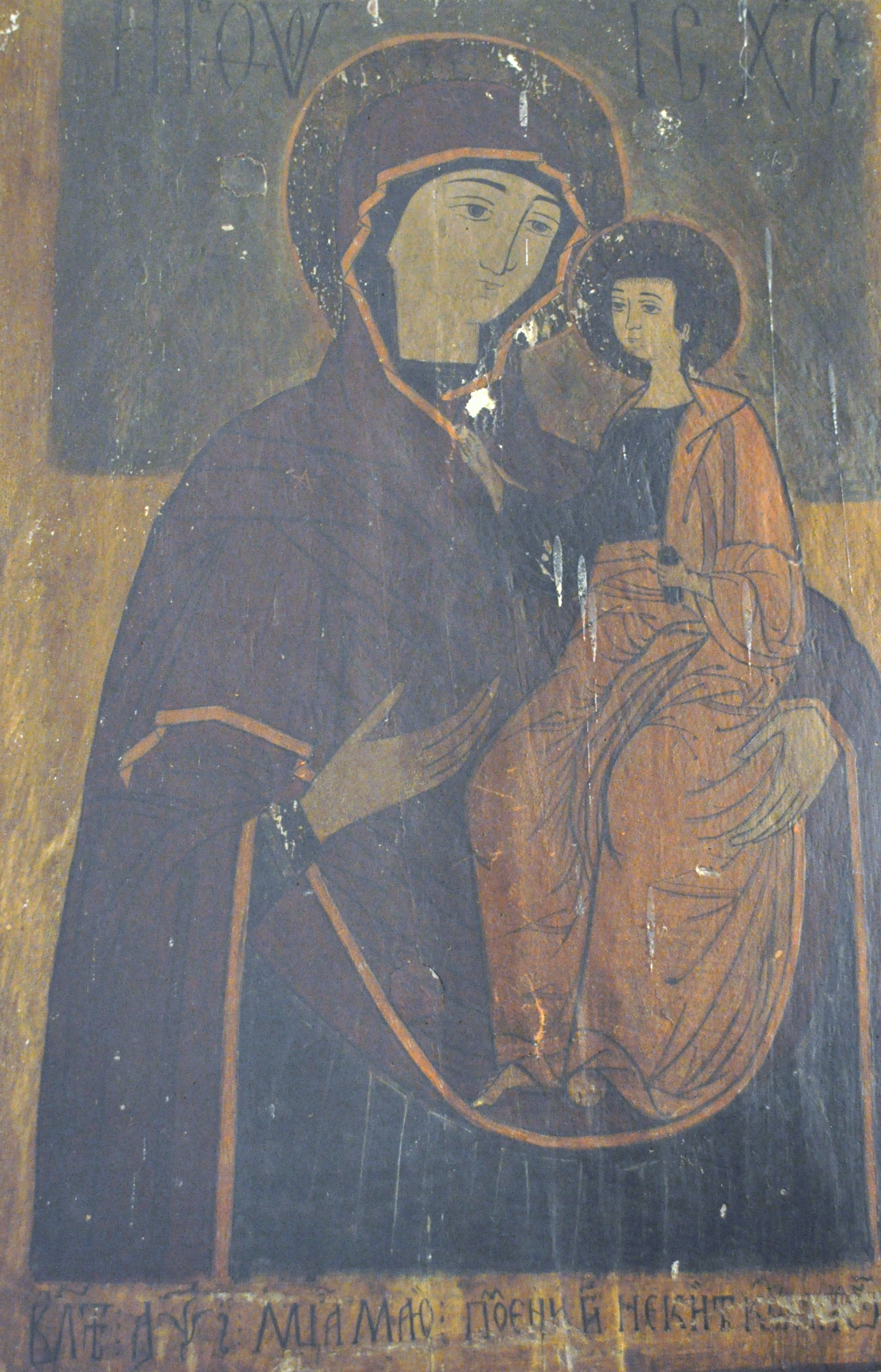 Biserica de lemn „Adormorea Maicii Domnului” din Vidolm, județul Alba